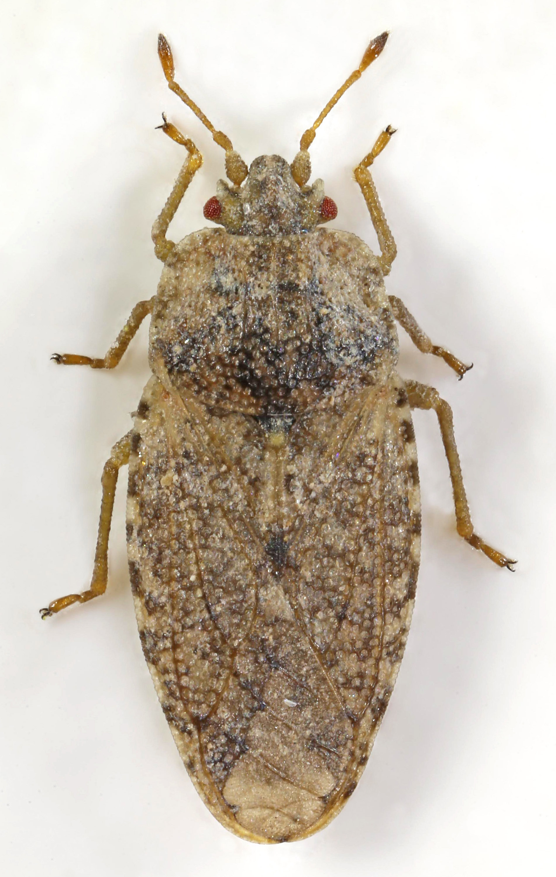 Parapiesma quadratum, Deeside, North Wales, Sept 2016